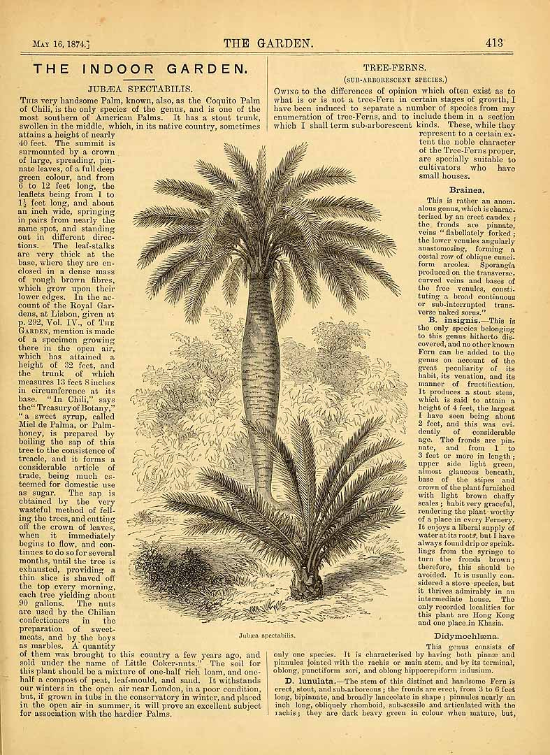 Cocotier du chili adulte et jeune